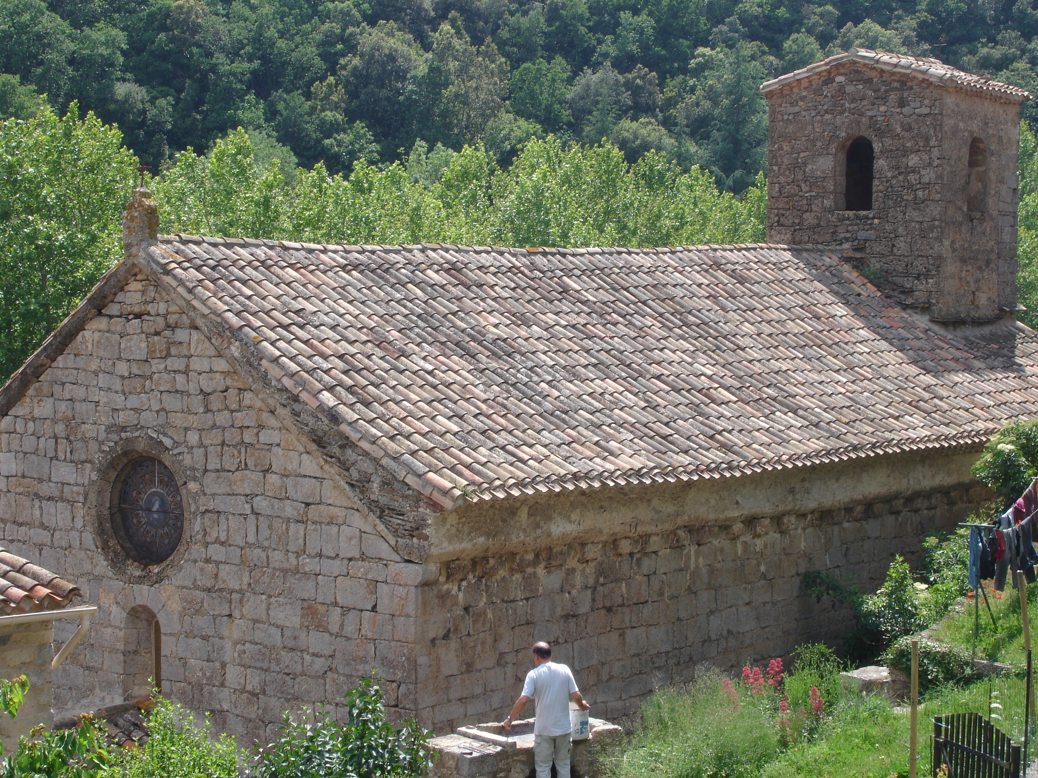 France, Aude (11), église de Termes